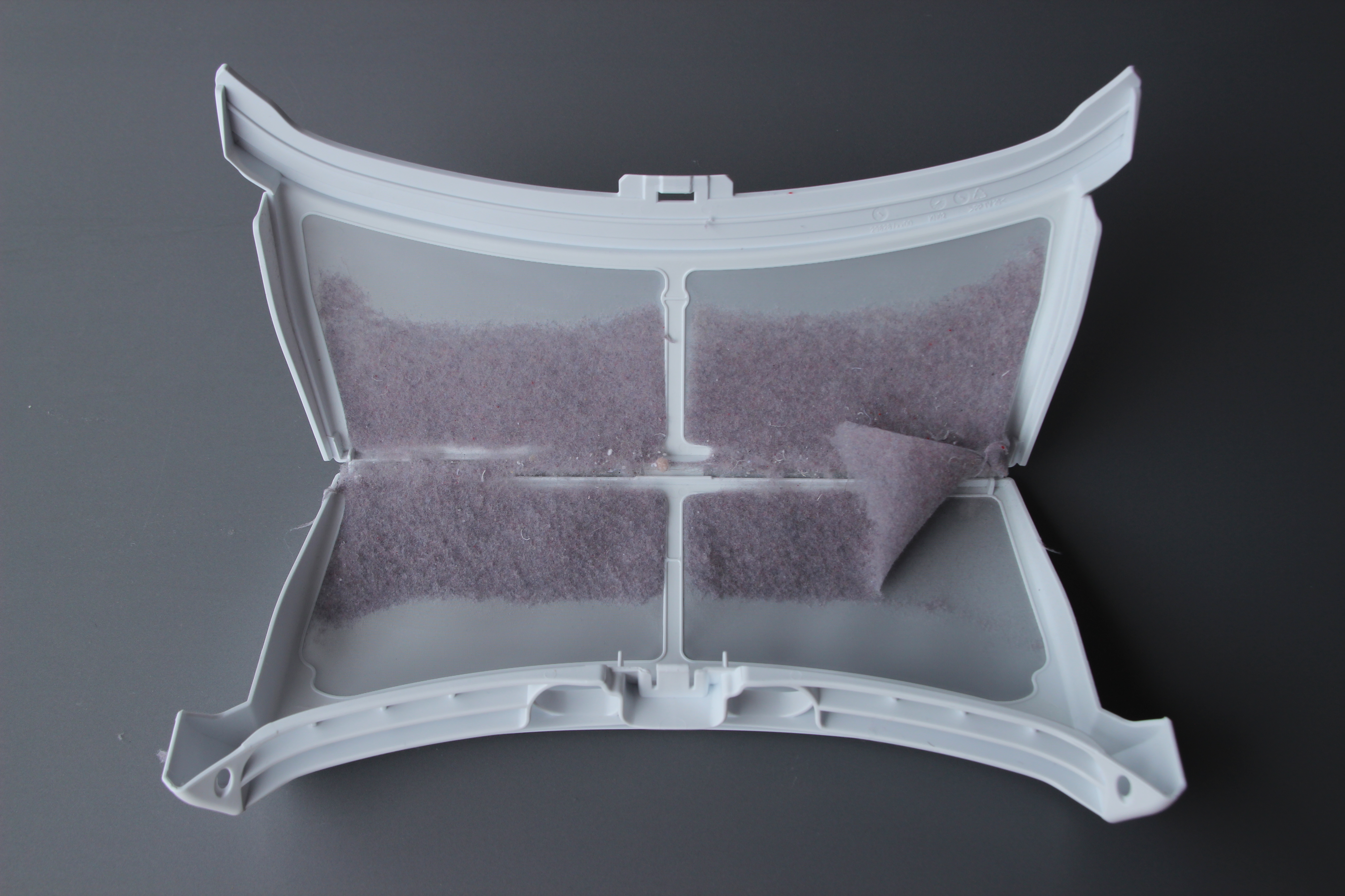 Bildinhalt: Geöffnetes Flusensieb eines Wäschetrockners mit Flusen. Eine Ecke der Flusen ist umgefaltet. Aufnahmeort: Frankfurt am Main, Deutschland